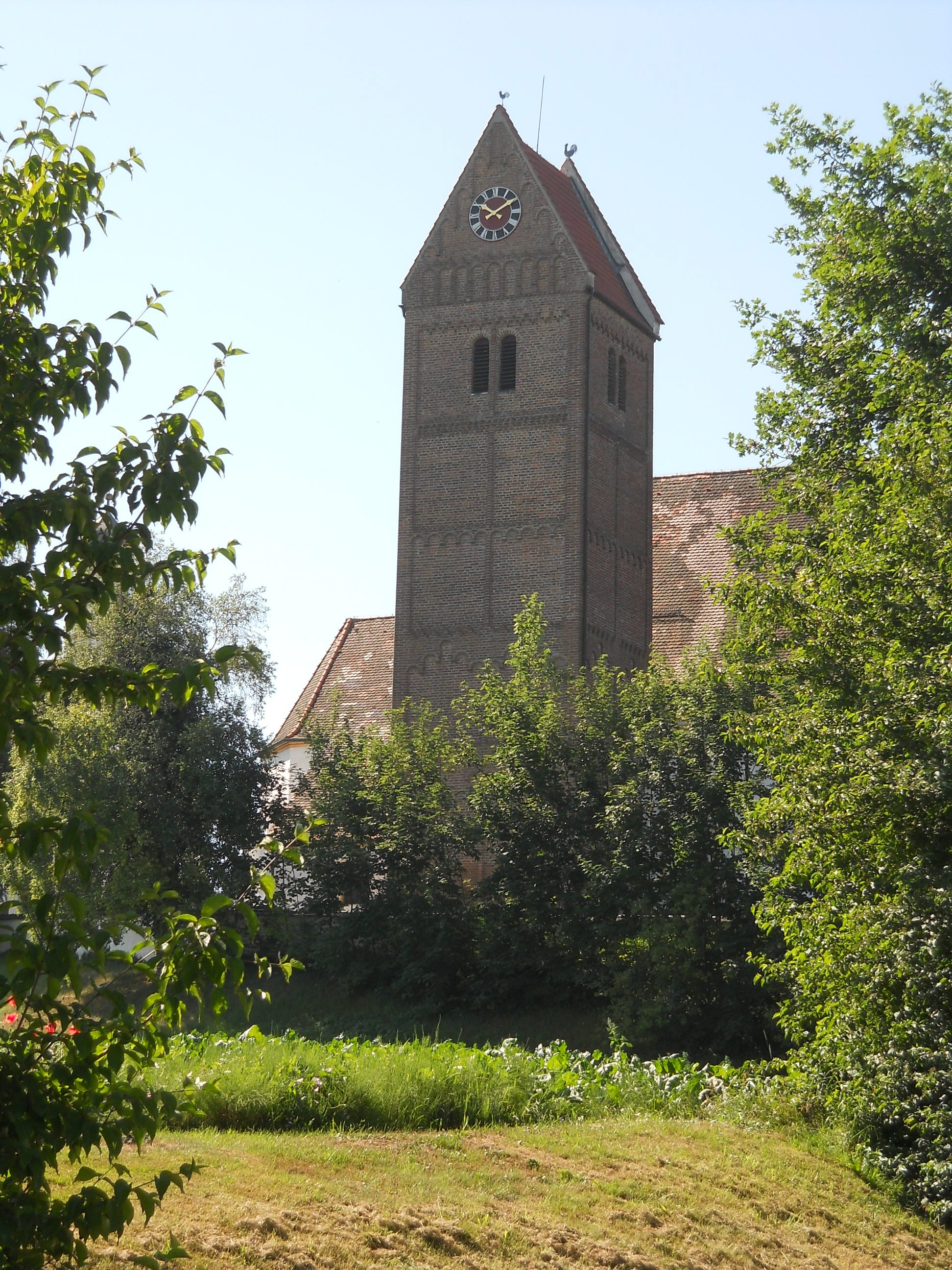 Gempfing (Ortsteil von Rain am Lech im Landkreis Donau-Ries), Kath. Pfarrkirche St. Vitus, Kirchturm